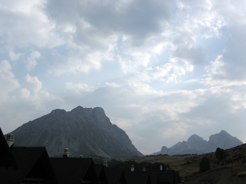 Komovi u sumrak